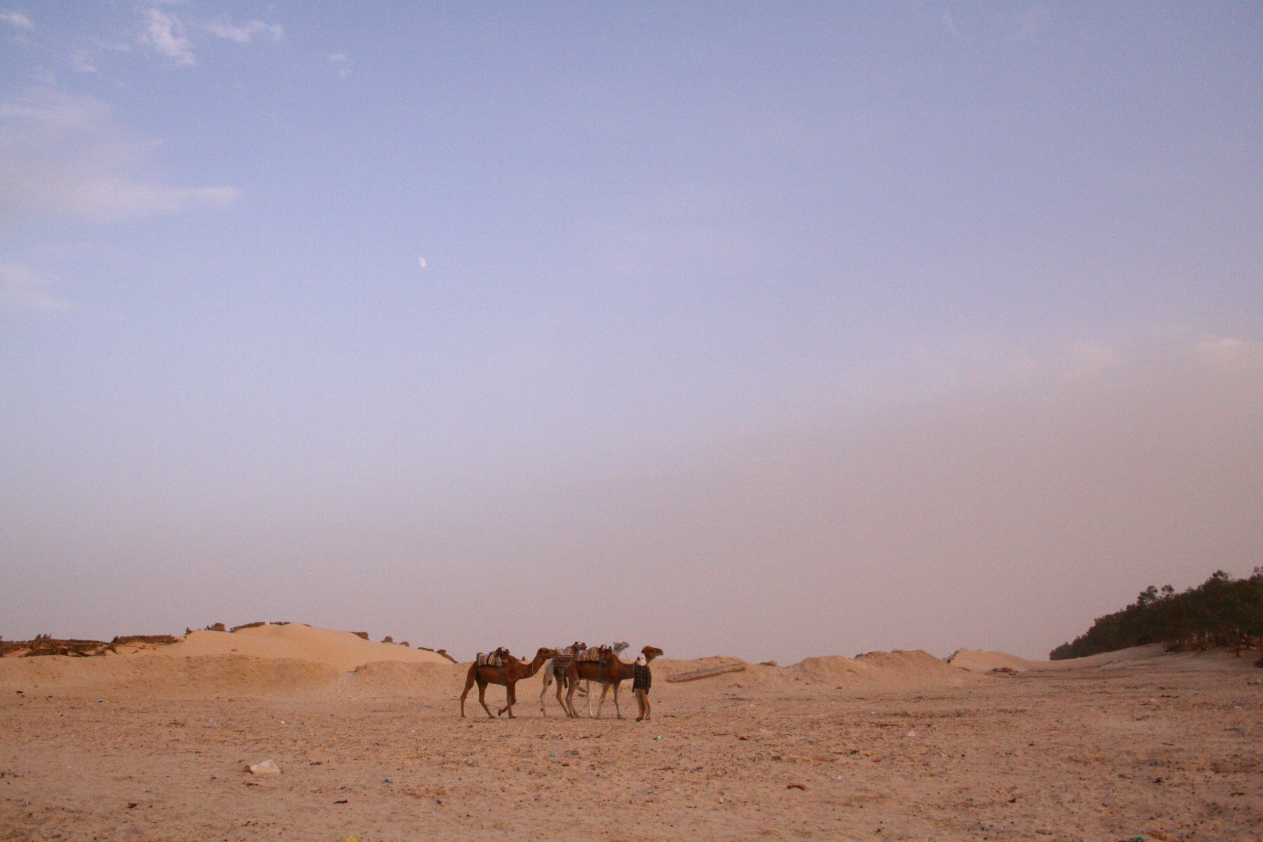 караванщики в Сахаре